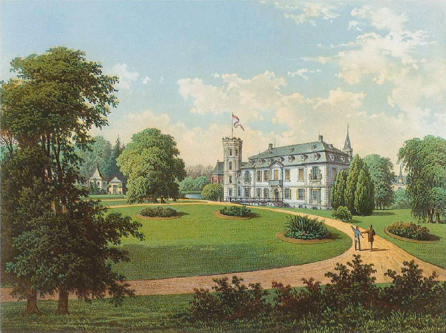 Lithografie mit einer Ansicht von Schloss Rurich, Landkreis Erkelenz, Rheinprovinz